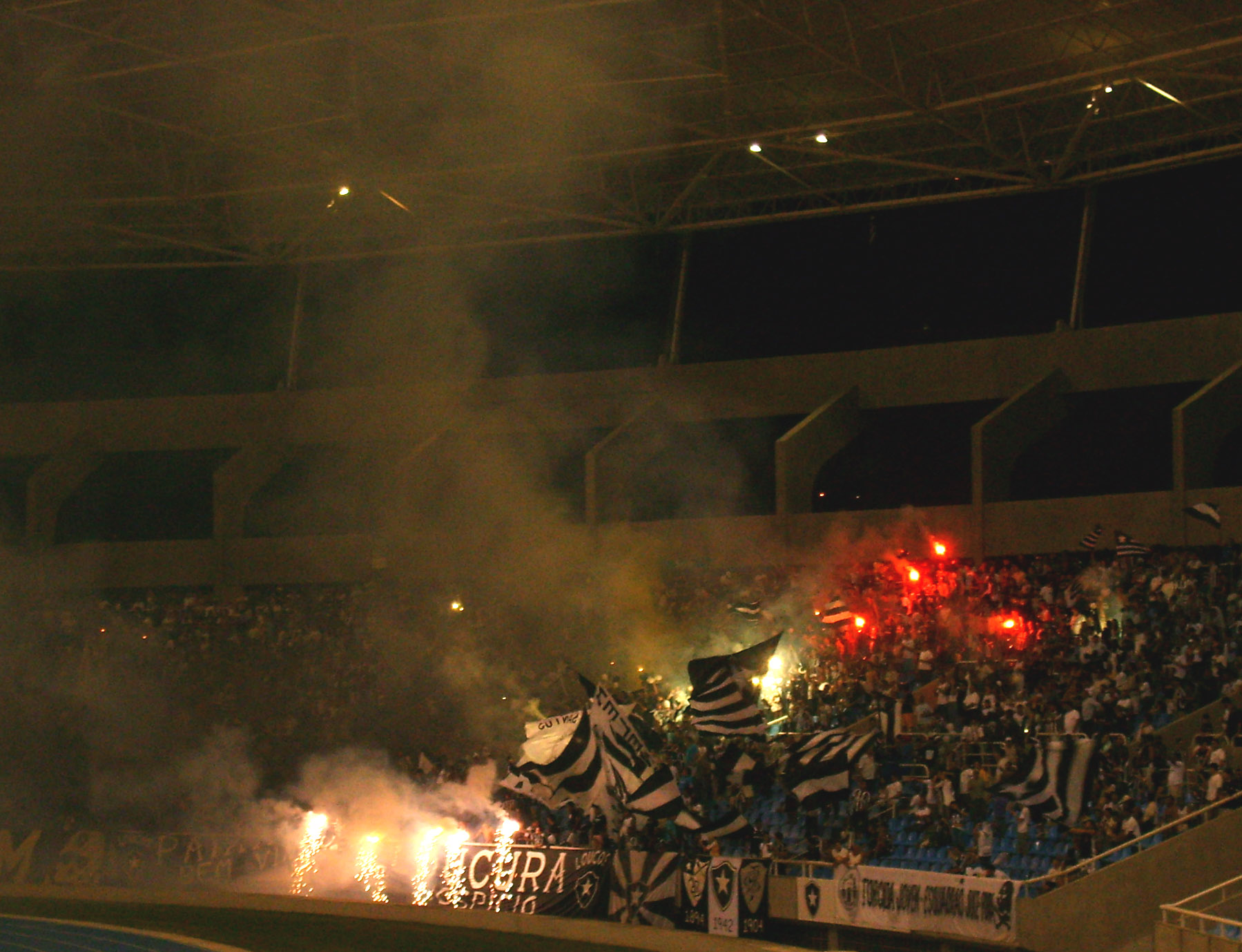 O movimento Loucos pelo Botafogo recebe o Botafogo FR na partida contra o Corinthians, válida pelo primeiro jogo semifinal da Copa do Brasil de 2008, em 20 de maio deste ano, no Engenhão.